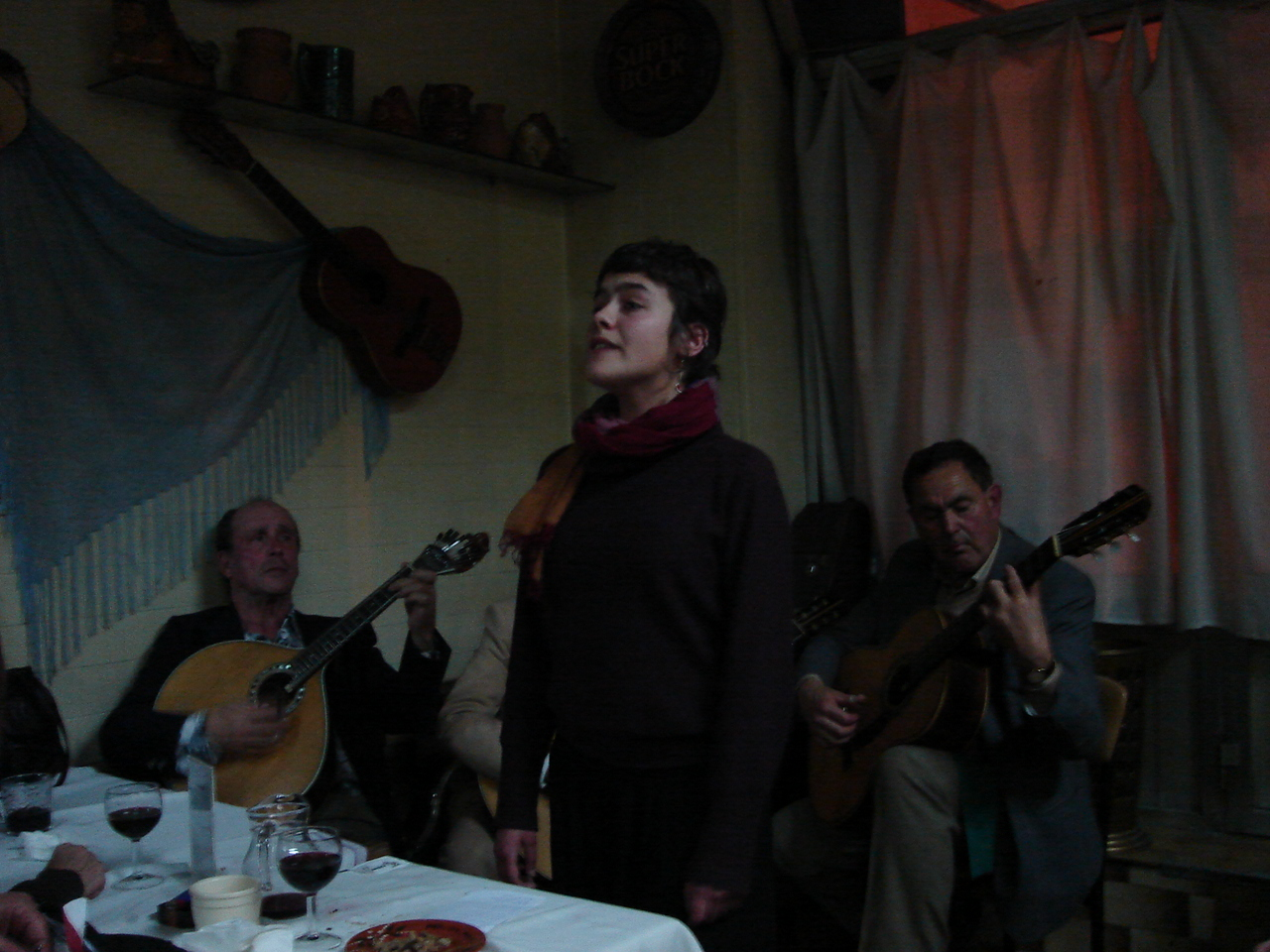 A fado singer in O Boteko, Rua Dom Manuel II, Porto, Portugal